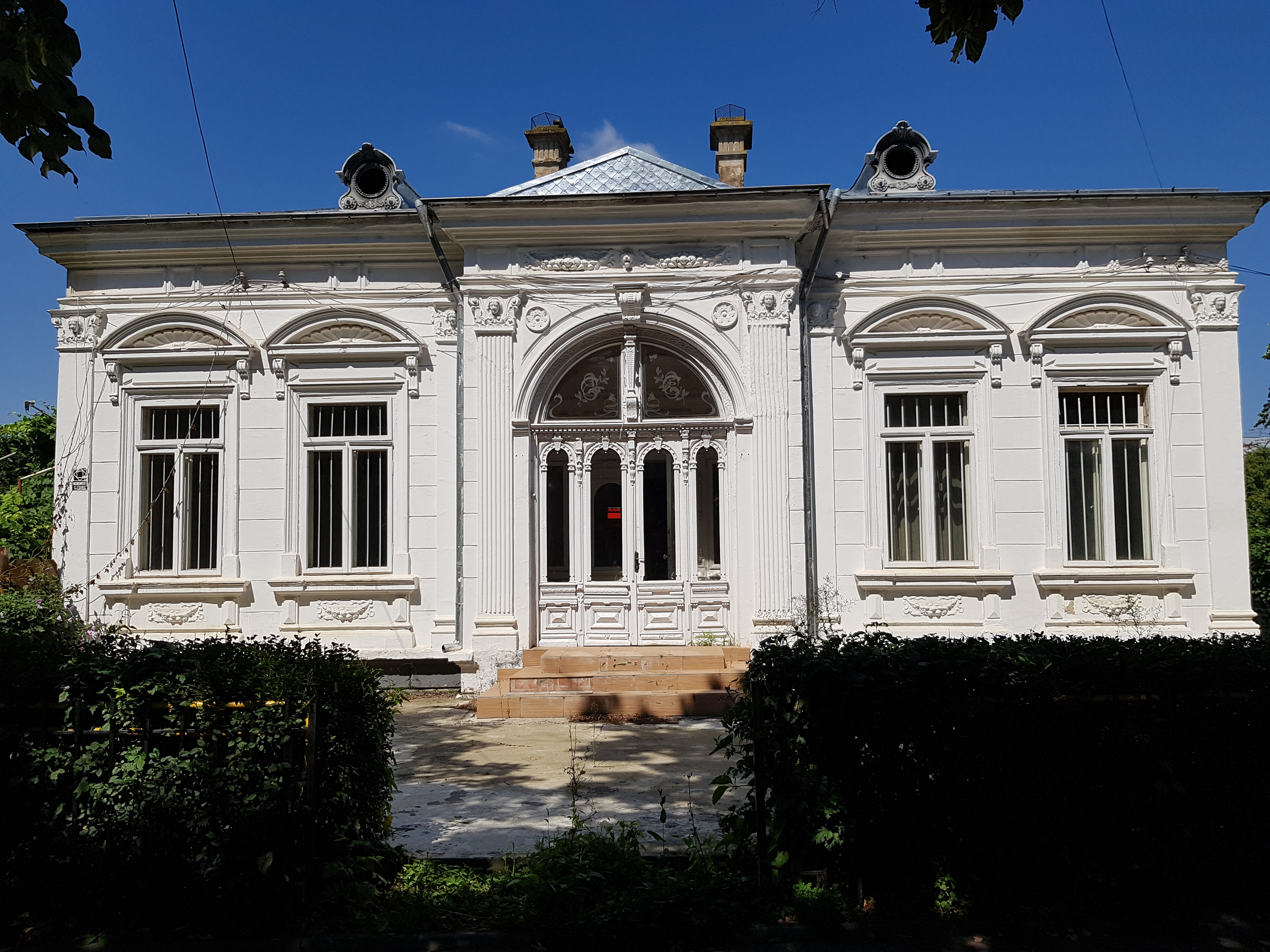 Casa Leon Cracalia